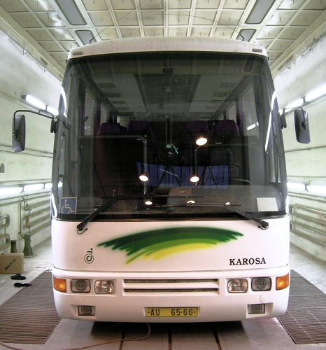 Česky: Vůz HD12 speciálně upravený pro Jedličkův ústav.